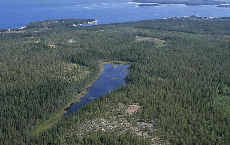 Mjötjärnen Motiv: Jävre Nyckelord: Flygbilder, Riksintressen Kategori: Kust- och skärgårdsmiljöMjötjärnen.